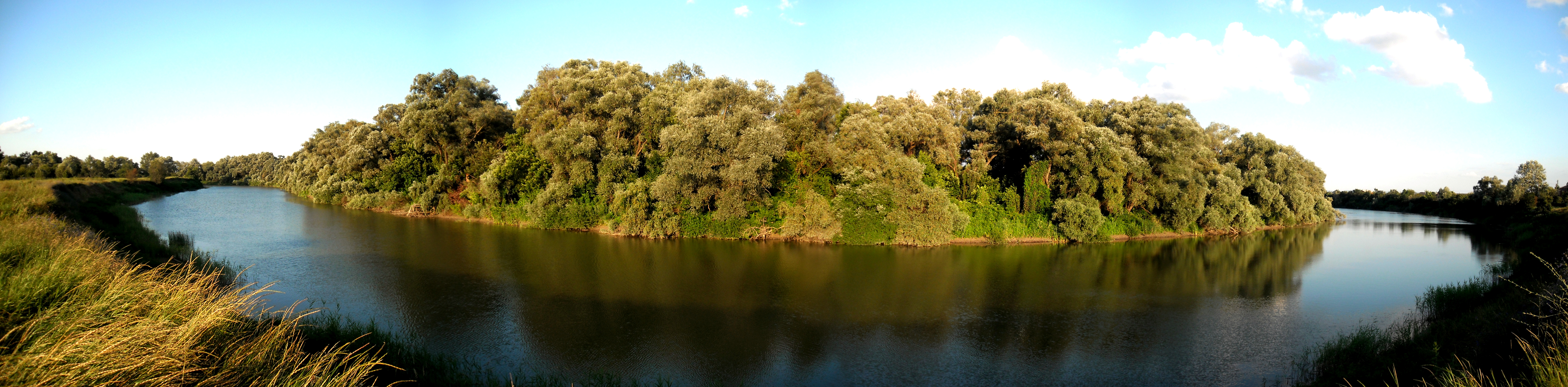 Посёлок Афипский. Панорама реки Афипс.